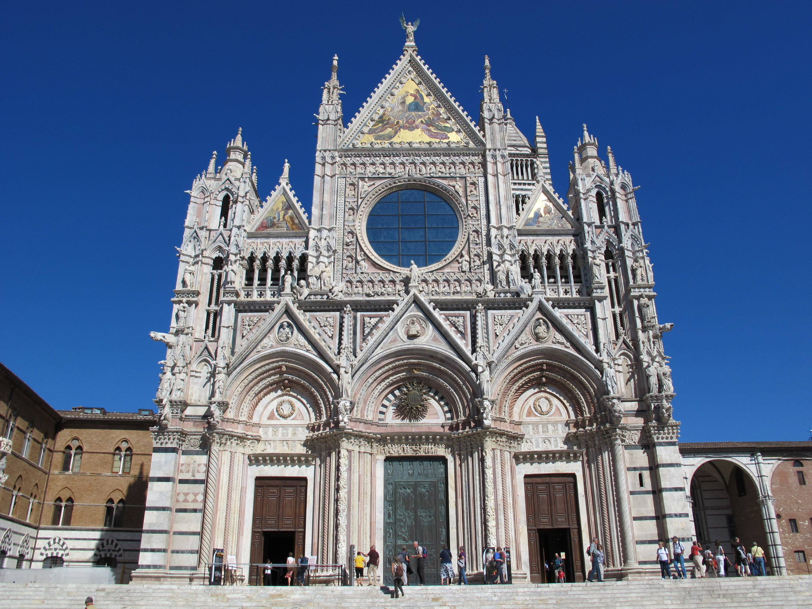 Duomo di siena, facciata